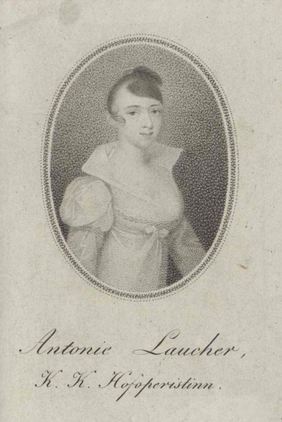 Porträt der Hofopernsängerin Antonie (Antonia) Laucher um 1807 (gerade gerichtet und etwas beschnitten). In den Erinnerungen Joseph Carl Rosenbaums am 12. Oktober 1807 erwähnt und im Wiener Hof-TheaterTaschenbuch von 1808, das 1807 erschienen ist, abgebildet..